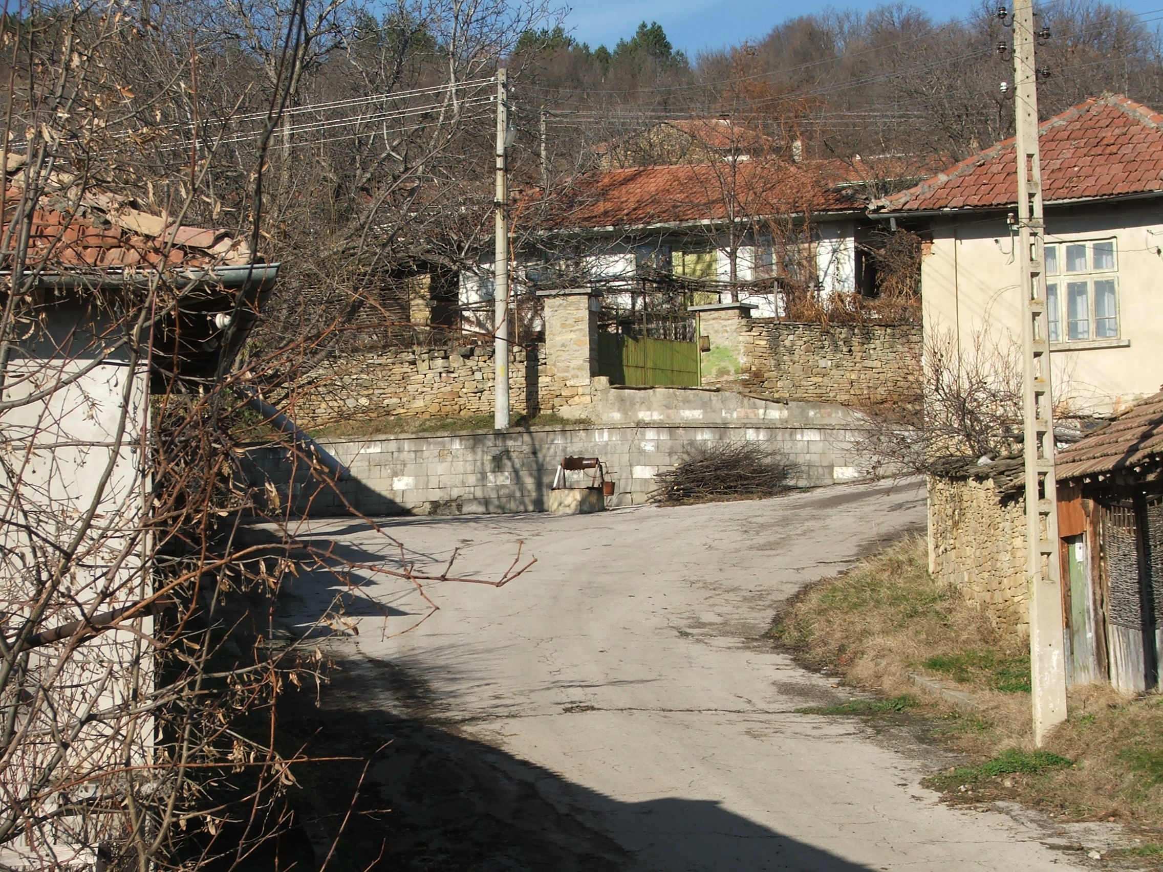 Gostilitsa in Bulgaria